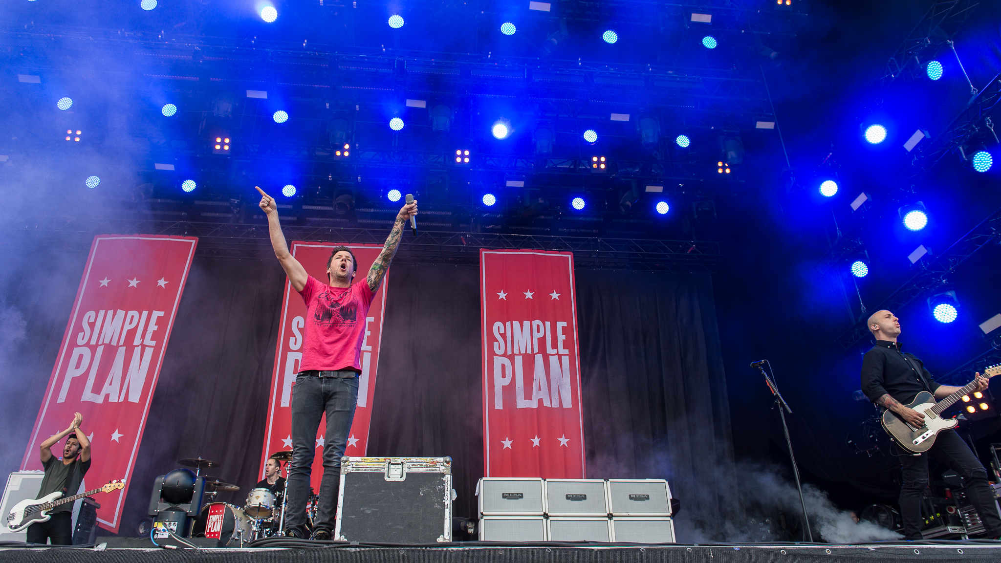 ARGO-Konzerte,Beck's Park Stage,Chuck Comeau,Jeff Stinco,Konzert,Livekonzert,Livemusik,Musik,Pierre Bouvier,RiP,Rock im Park 2017,Simple Plan,Sébastien Lefebvre